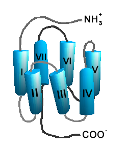 Schematische Darstellung der Struktur eines G-Protein-gekoppelten Rezeptors.